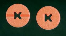 Clonazepam tablets Klonopin 0.5mg.